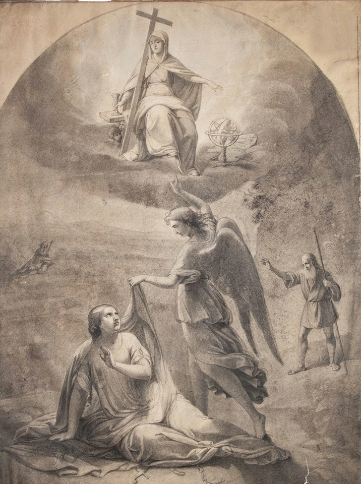 Gheorghe Tattarescu - Renașterea României (studiu), desen în cărbune, 0,90x0,68m - Muzeul Gheorghe Tattarescu